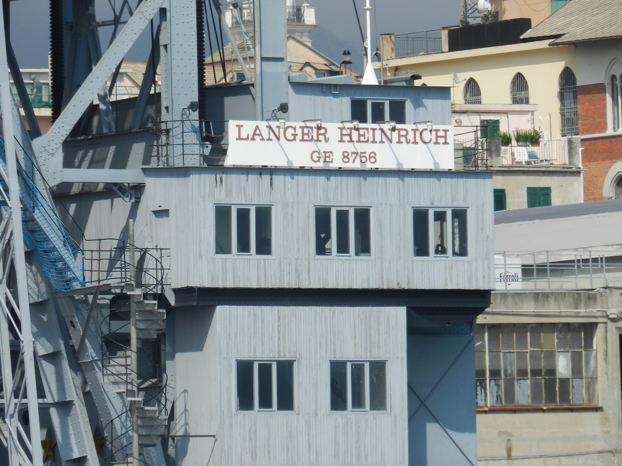 Fotografie des Schimmkrans Langer Heinrich im Hafen Genua